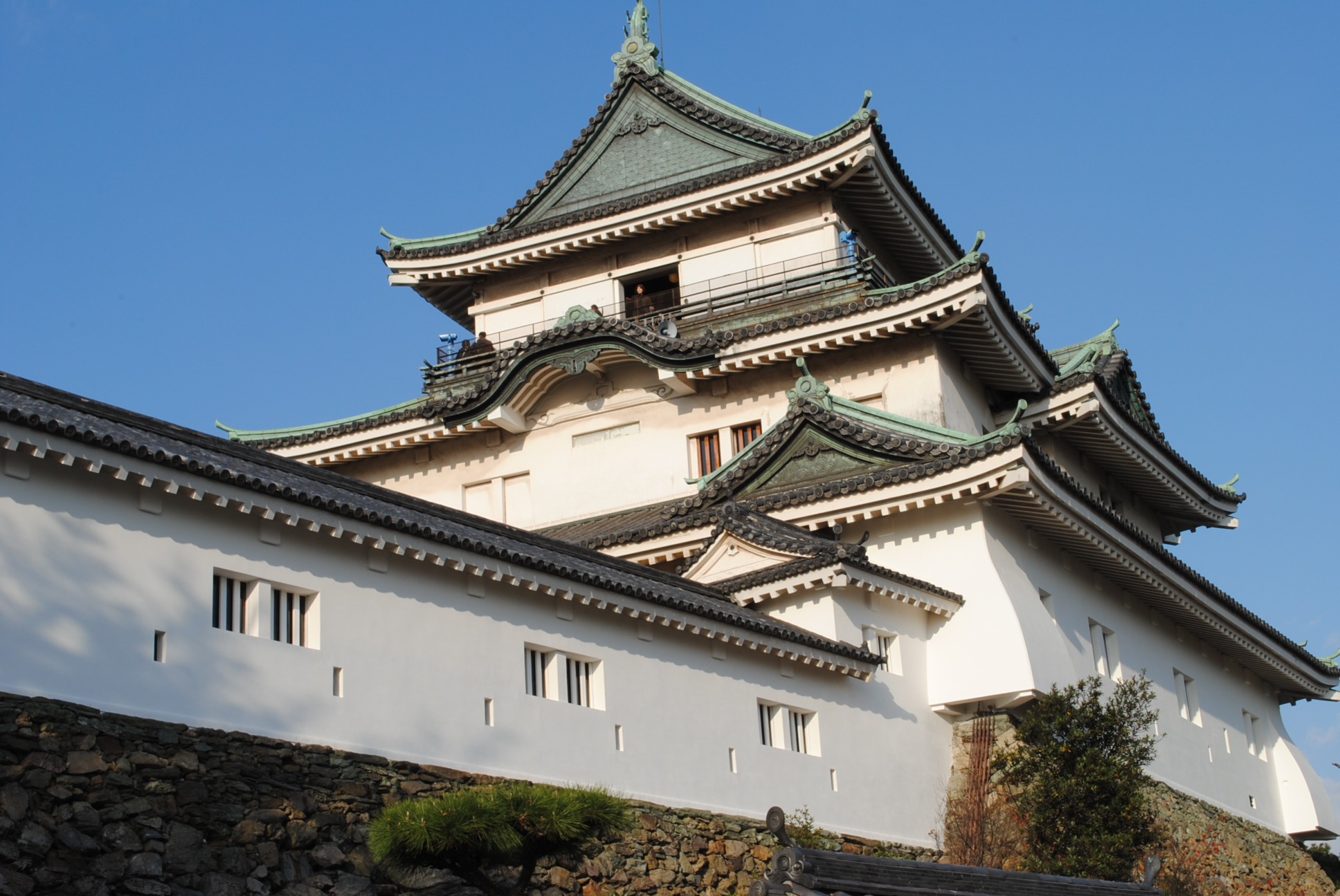 和歌山城 大天守